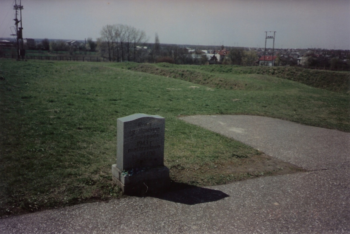 majdanek-mass grave